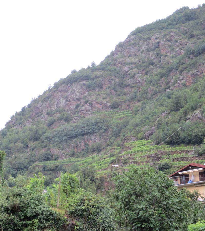 Terrazzi